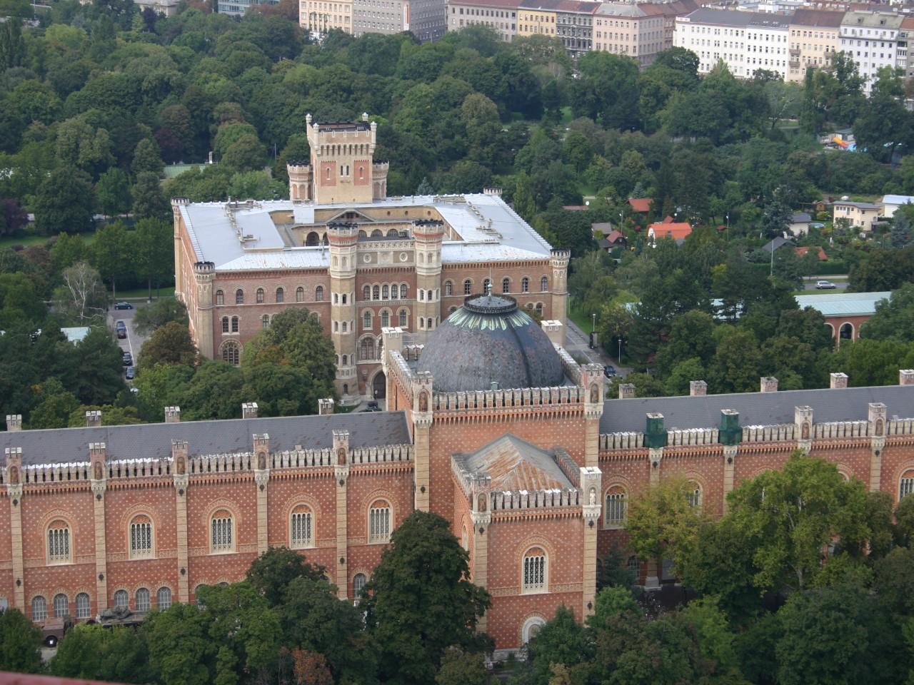 Bildbeschreibung: Arsenal Wien Quelle: selbst erstellt Fotograf: (Benutzer:deneb) Datum: September 2005